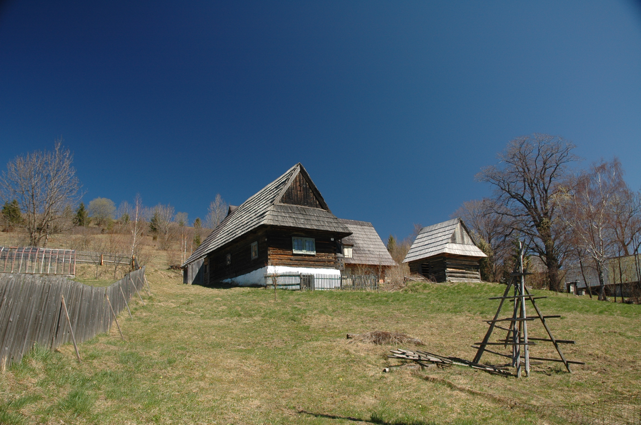 Veľké Borové, jar, chalupy